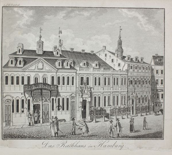 Ansicht des Gebäudekomplexes, bestehend aus dem alten Rathaus und Niedergericht in der Nähe der Trostbrücke